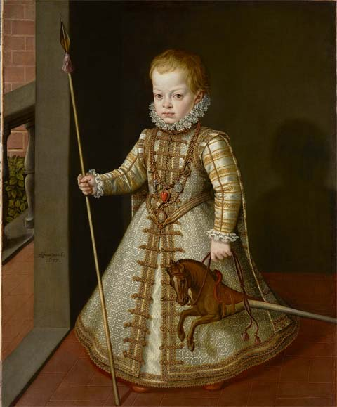 Porträt des Infanten Don Diego (1575-1582)